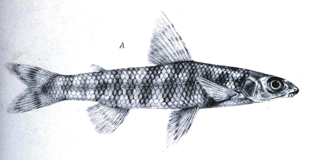 Afrikanischer Bodensalmler (N. fasciatus) Günther, 1867